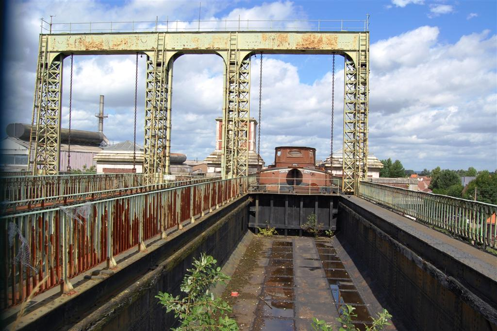 De voormalige scheepslift in Arques.